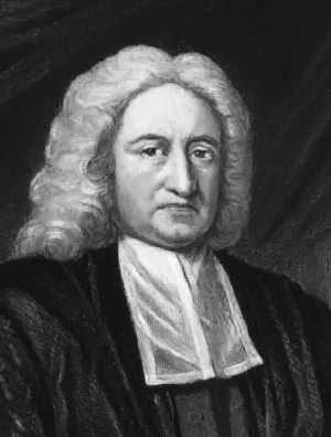 Edmond Halley licence